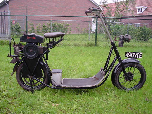 Scootamota